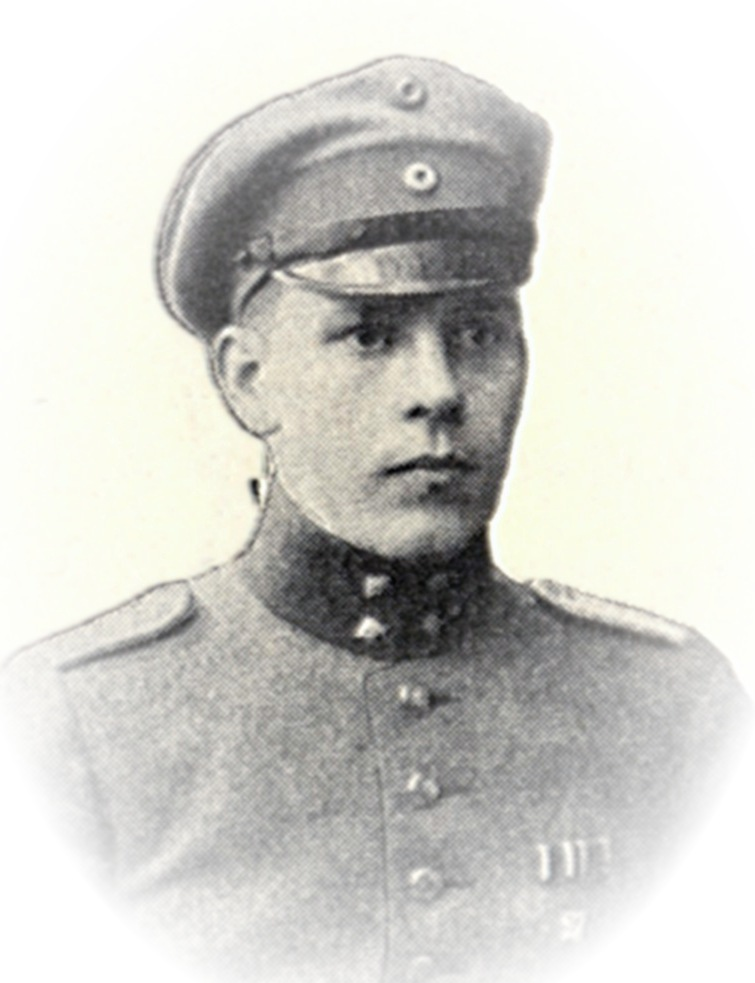 Description